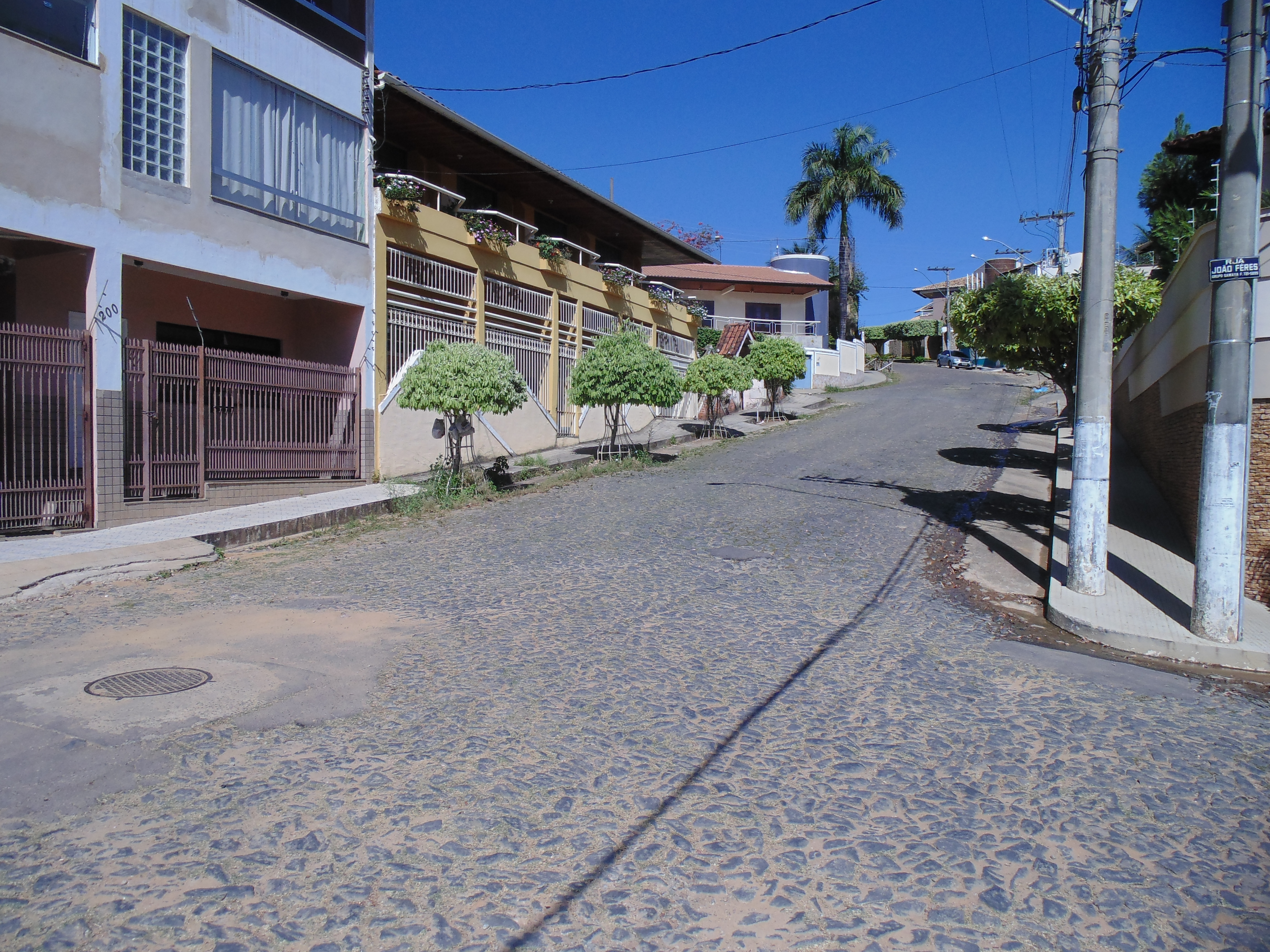 Vista cidade mineira de Muriaé.